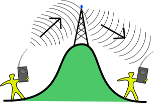 En bild som är tänkt att länkas till från "Repeater"-sidan. Den skall beskriva hur en repeater länkar ihop två sändare, som en slags brygga emellan.